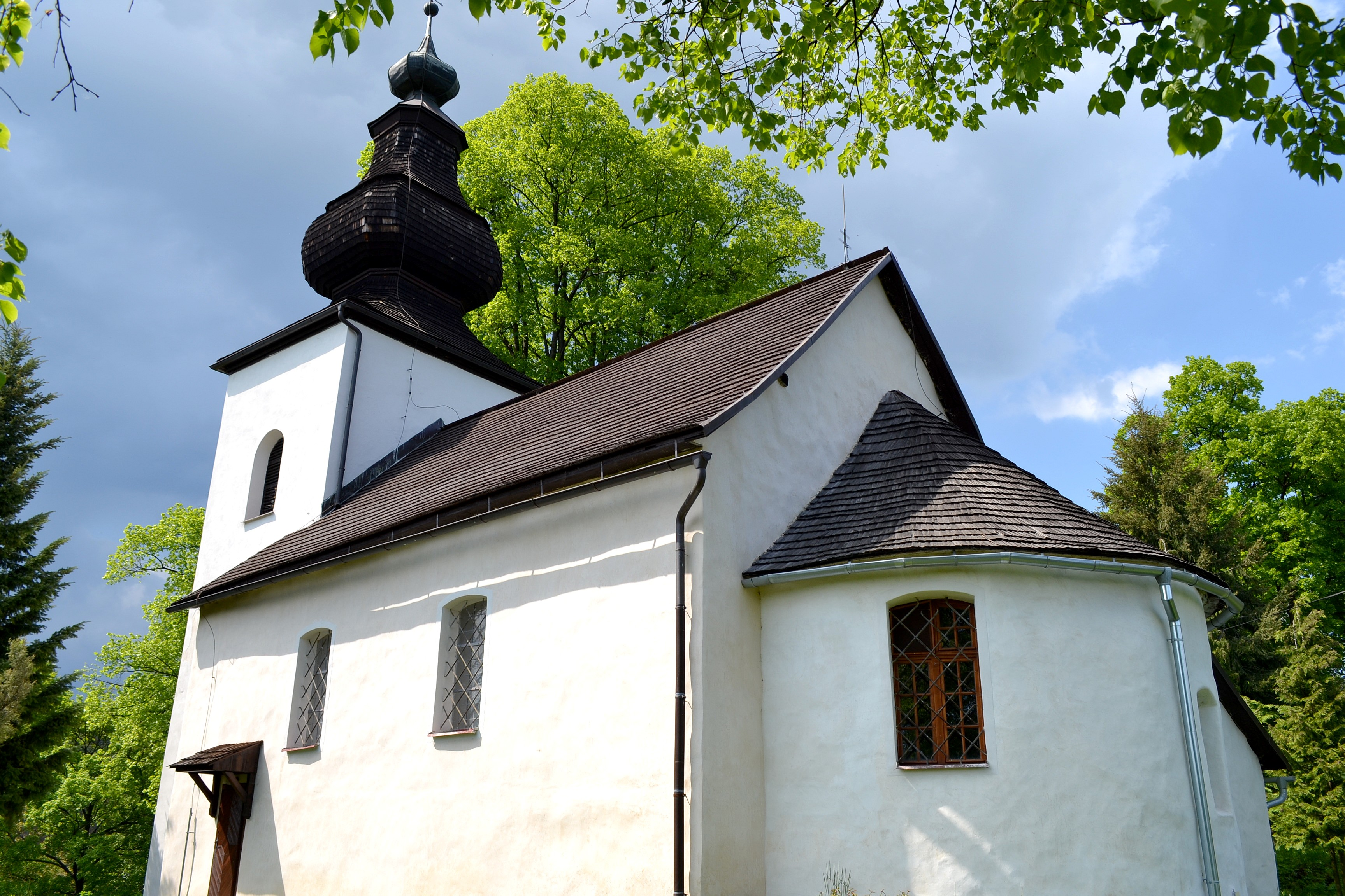 Rímskokatolícky gotický Kostol svätého Egídia z prvej polovice 13. stor.